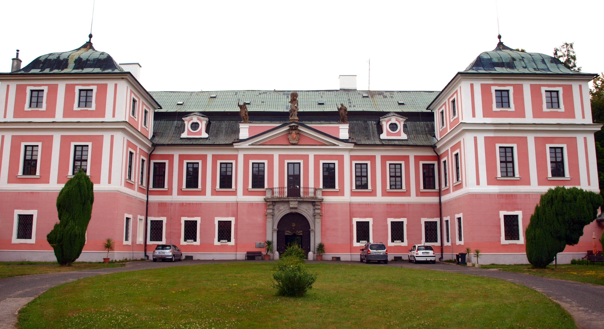 zámek ve Sloupu v Čechách